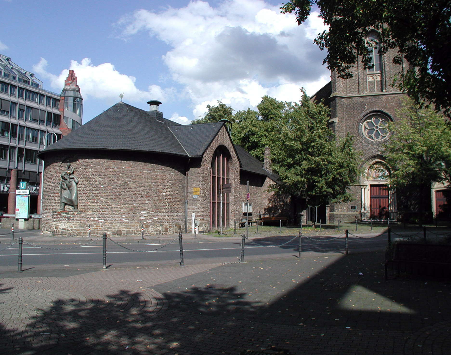 Köln, Kalker Kapelle